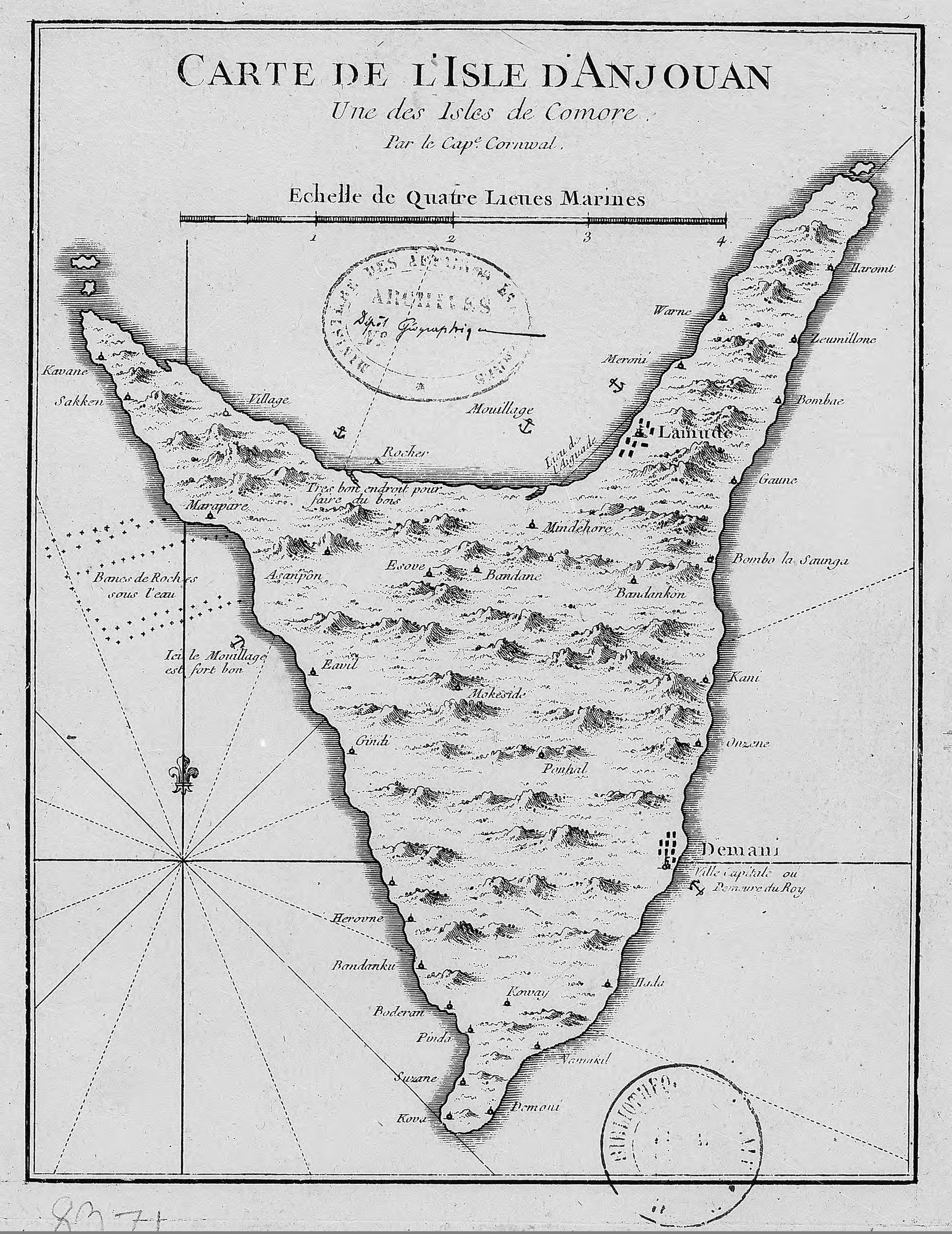 Carte de l'isle d'Anjouan, une des isles de Comore / par le Cap. Cornwal